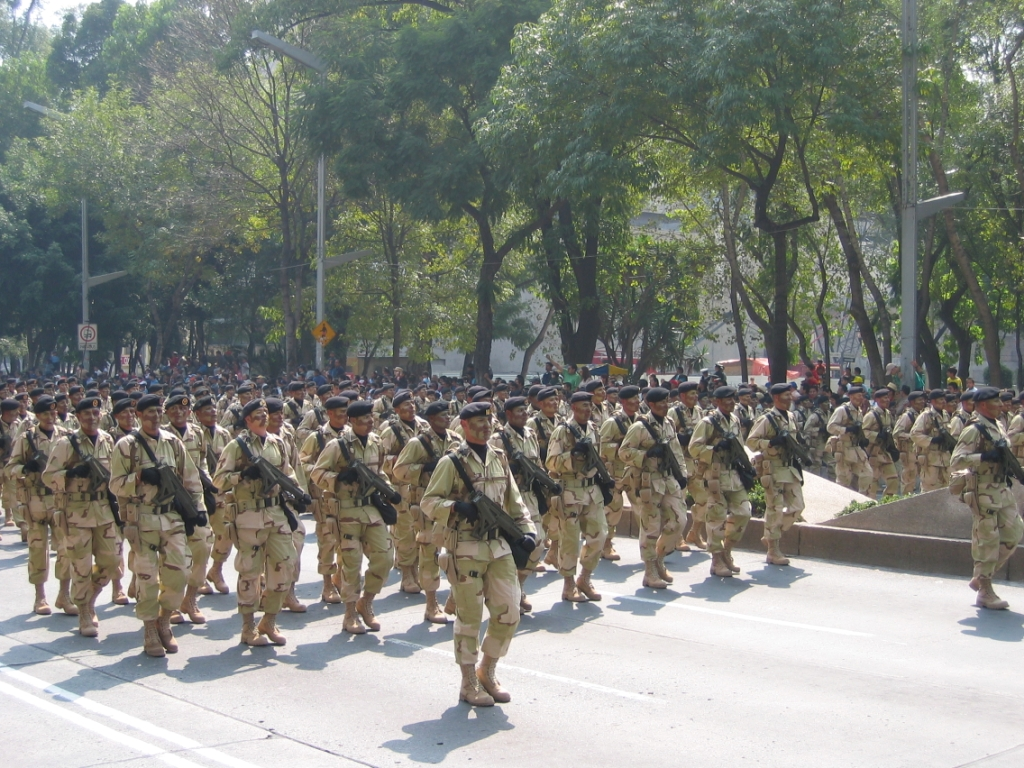 Fuerzas Especiales. Ejercito Mexicano